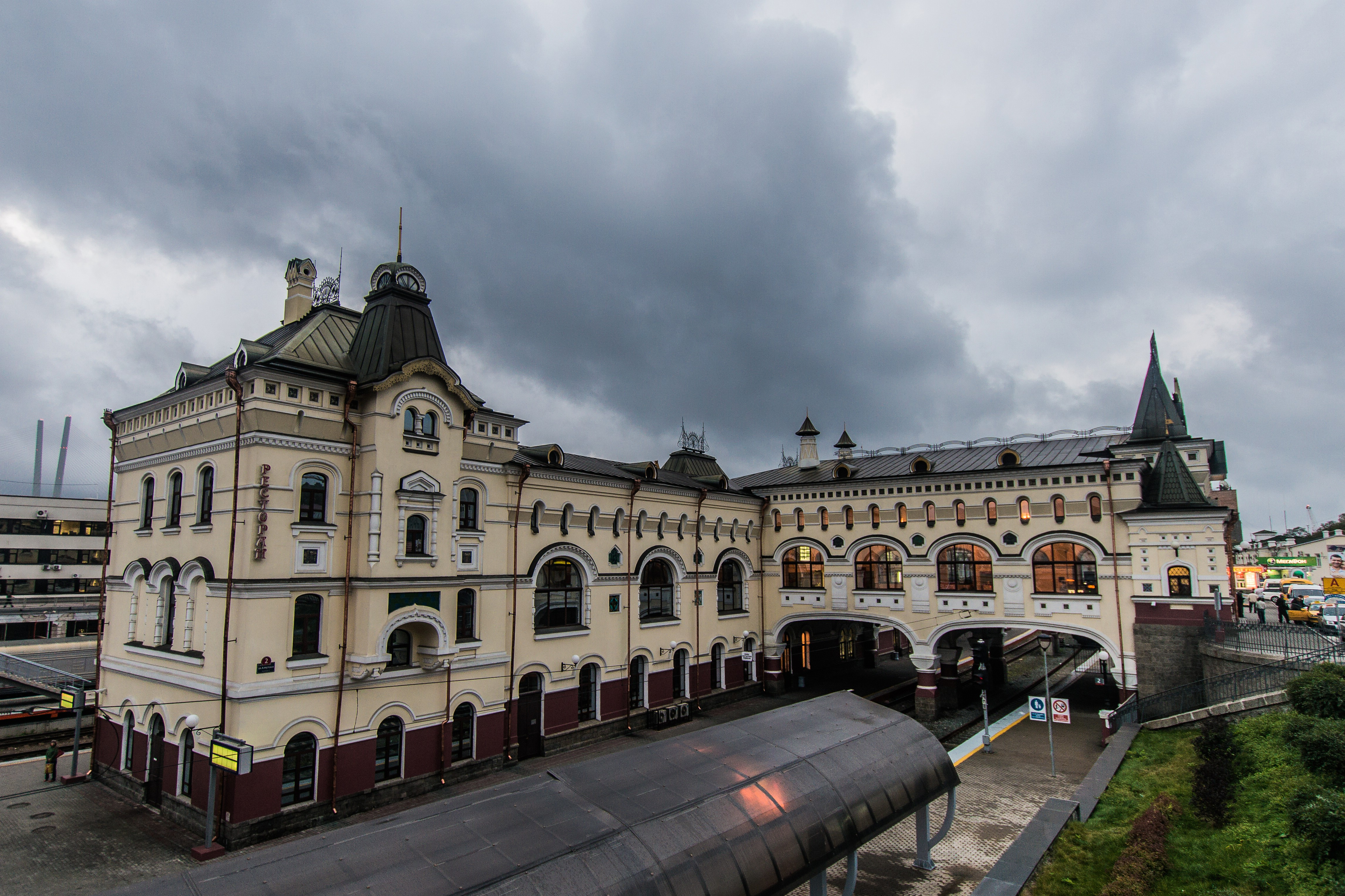 Здание железнодорожного вокзала, связанное с революционными событиями 1905—1906 гг. и борьбой в годы Гражданской войны и интервенции 1917—1922 гг. (Приморский край, Владивосток, Алеутская улица, 2 (Вокзальная площадь))